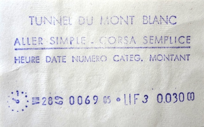 Quittance pour traversée du tunnel du Mont-Blanc le 28 juillet 1969.